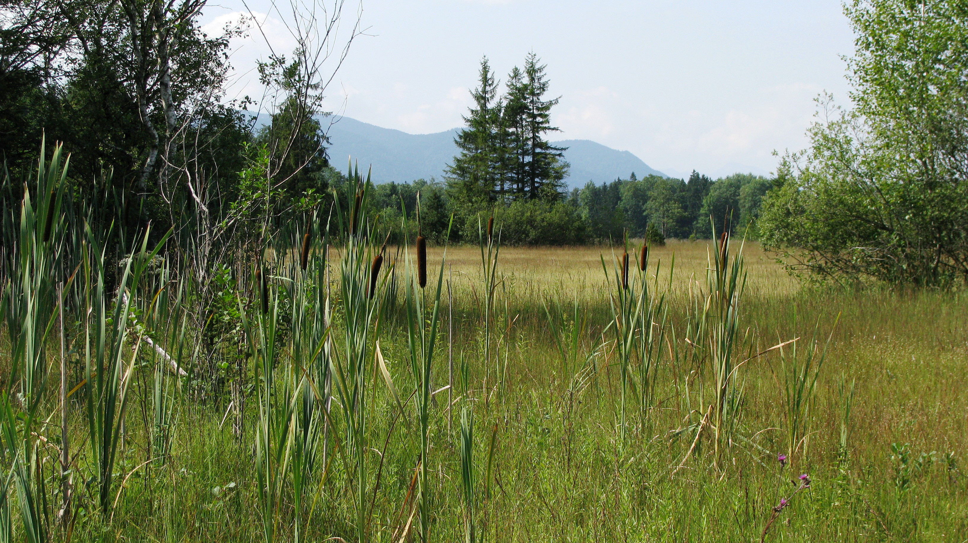 Habichauer Filzen